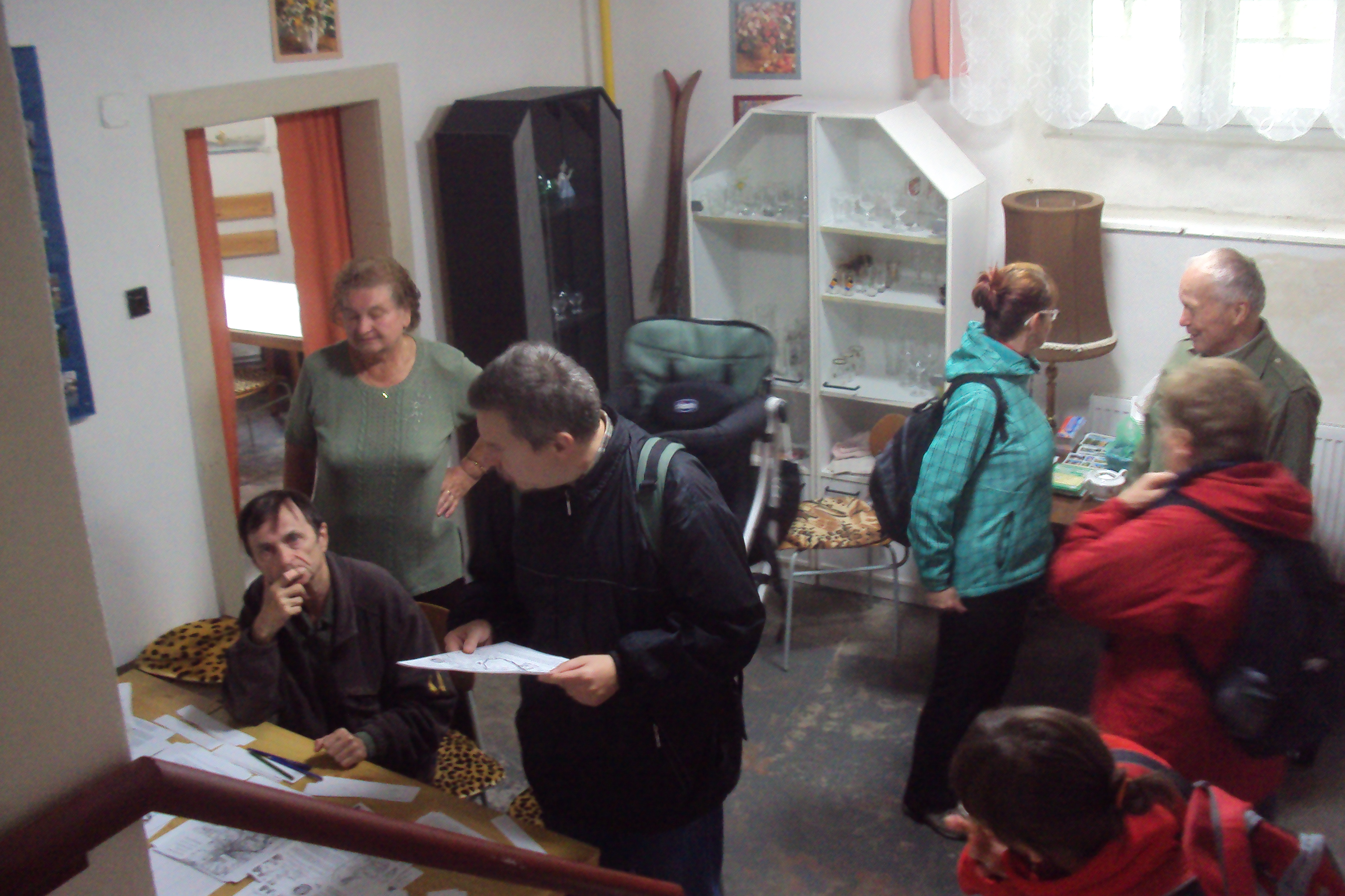 Místo startu i cíle pochodu na Adéle